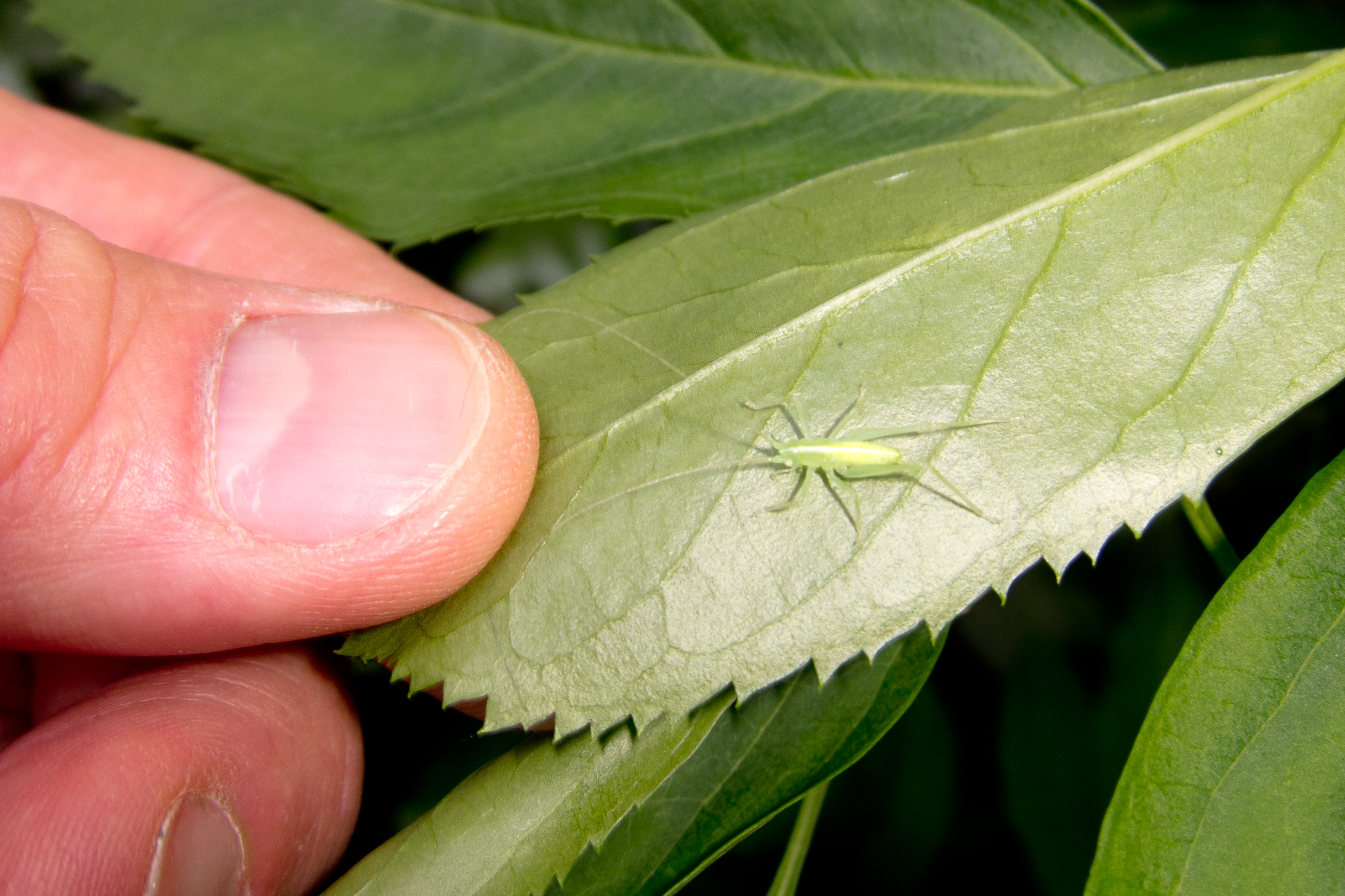 Berlin 2011